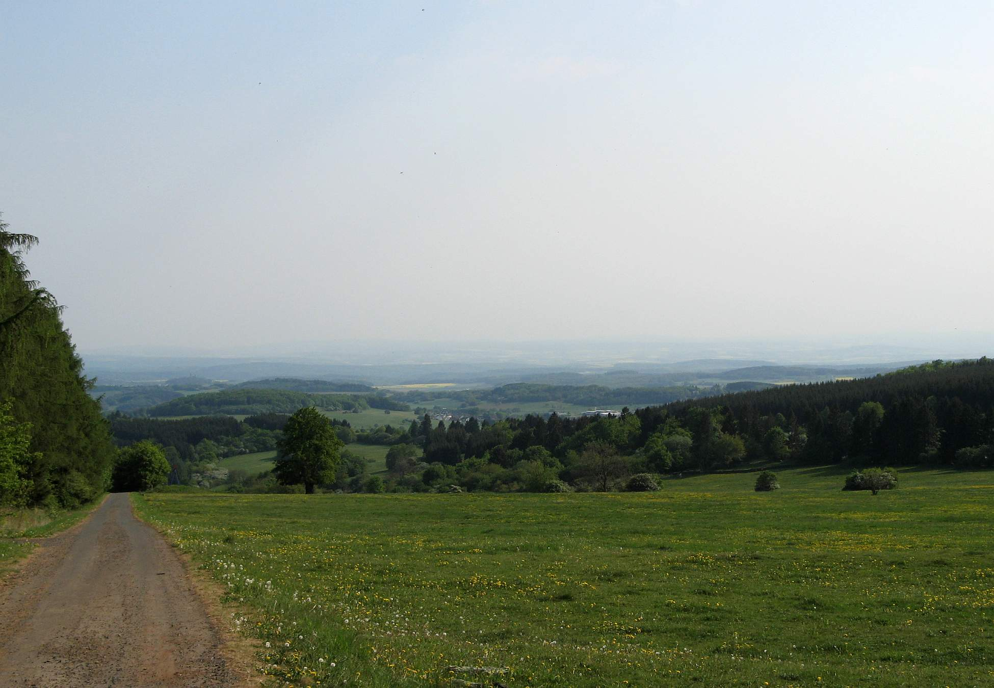 Blick vom Gipfel des Knotens über den Lahnwesterwald